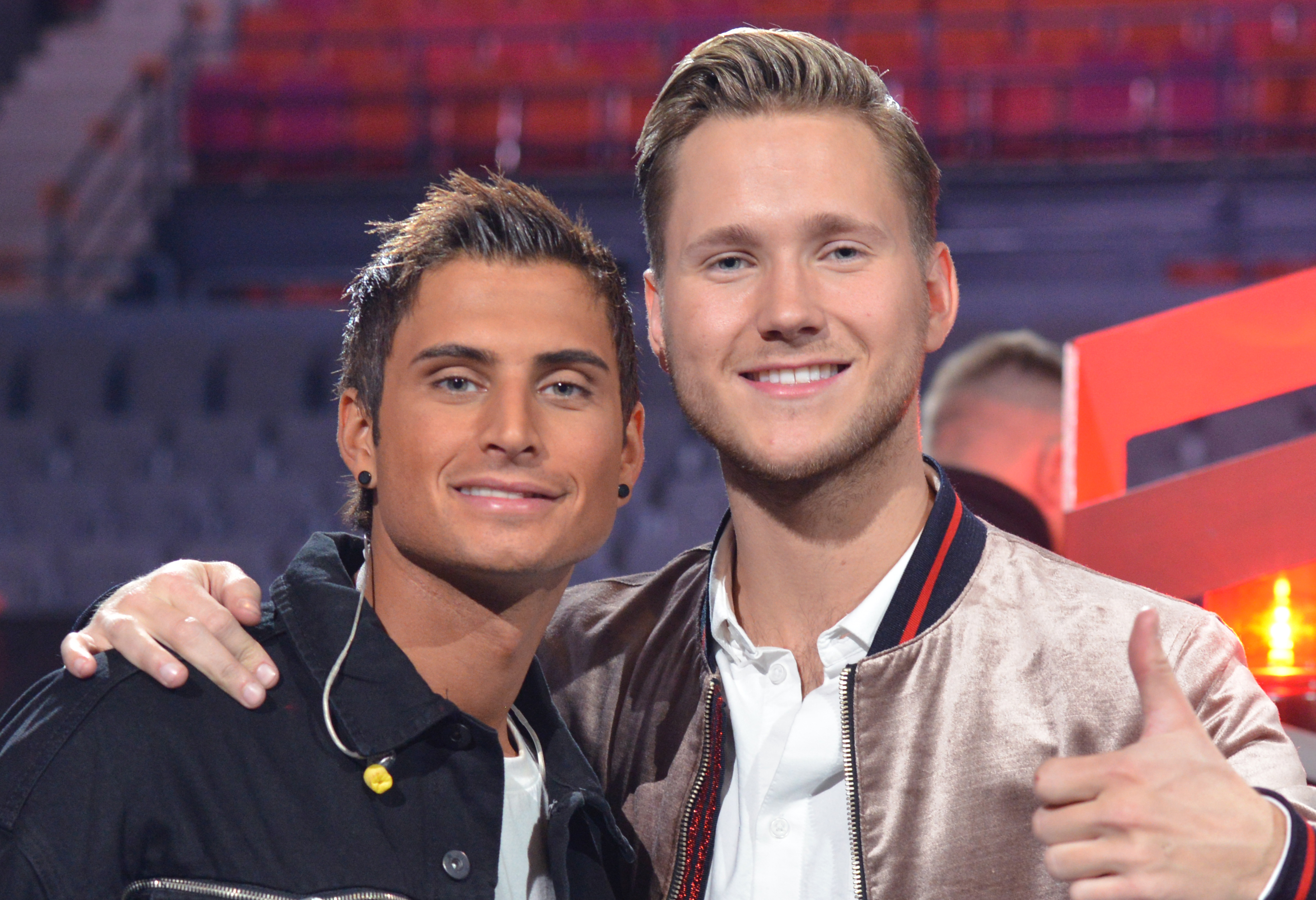 Melodifestivalen 2018, Deltävling 2, presskonferens, Scandinavium, Göteborg, Samir & Viktor.